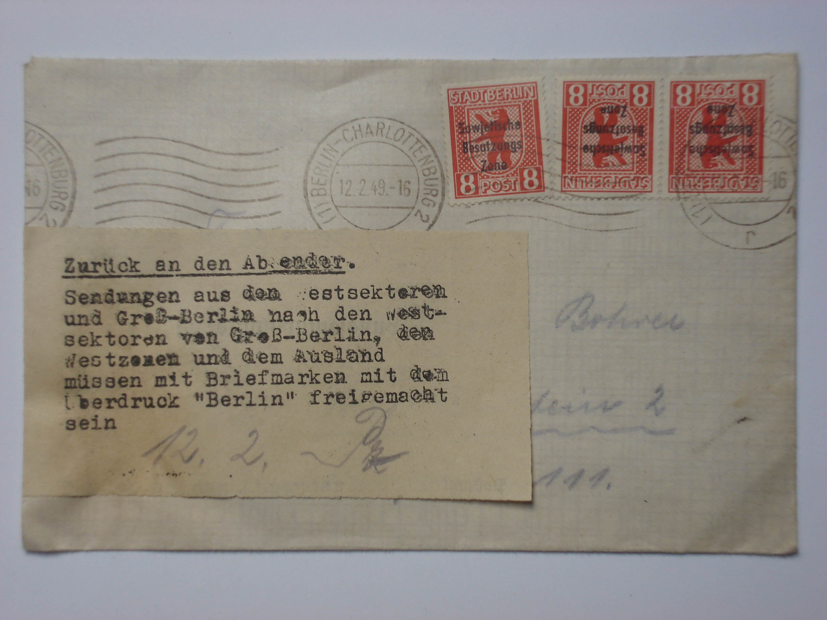 Brief 12. Februar 1949 aus Berlin-Charlottenburg mit Aufkleber "Zurück an den Absender". Verweigerte Beförderung wegen Freimachung mit nicht gültigen Briefmarken der "Stadt Berlin Post" mit Aufdruck "Sowjetische Besatzungszone" ohne Überdruck "Berlin", s.